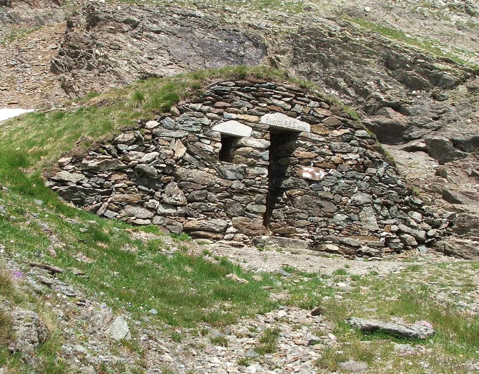 fatta da me - no copyright